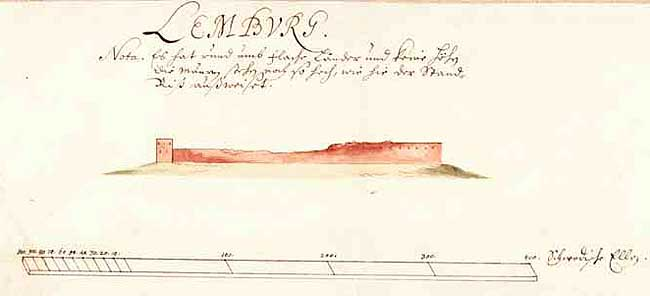 Rootsi inseneride XVII sajandi lõpus joonistatud skeem. Linnuse läänekülg.